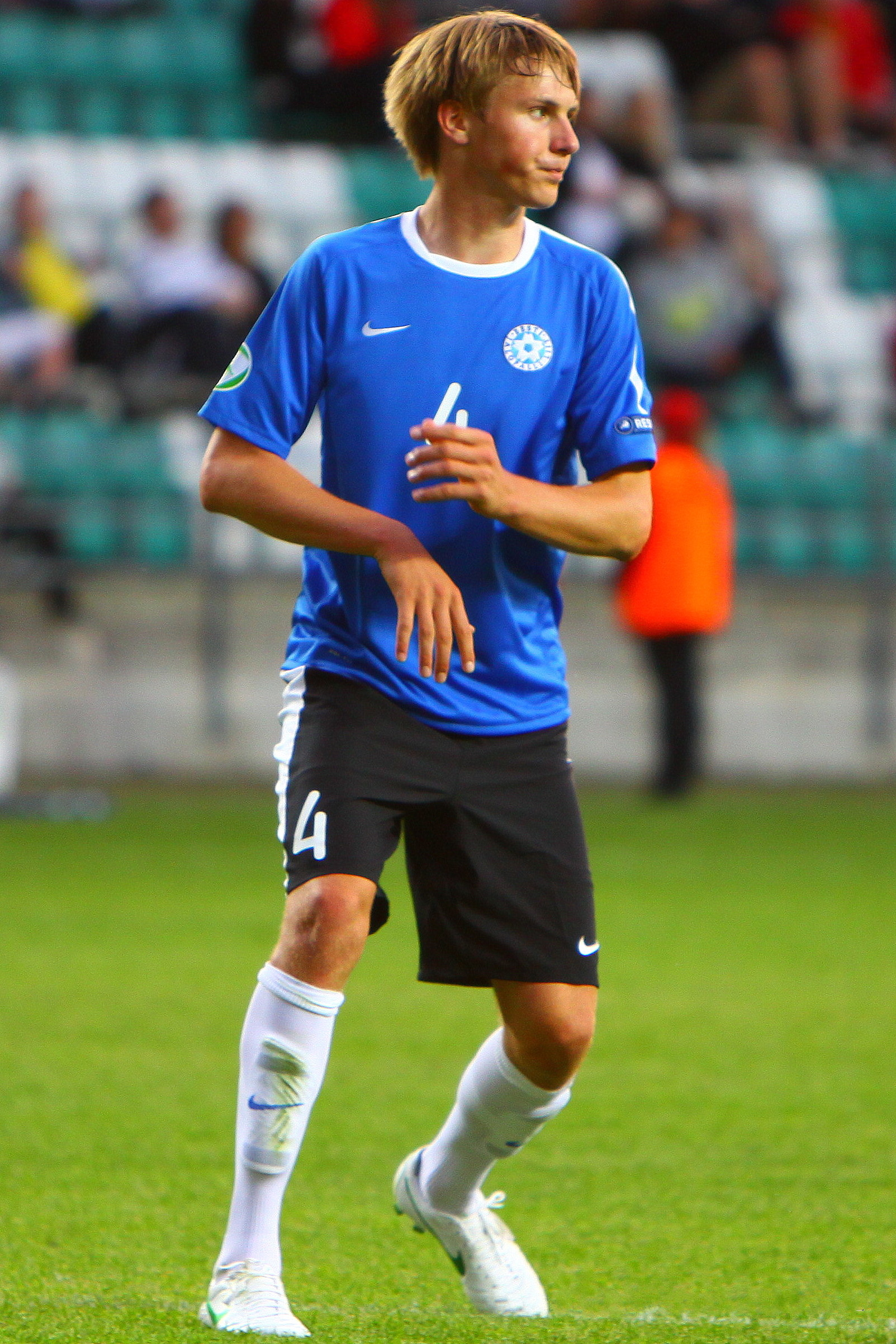 U-19 Estonia vs Portugal.